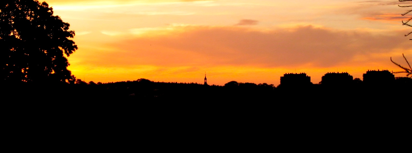 View of Chrzanów from Kościelec, 2006/Widok Chrzanowa od strony Kościelca 2006